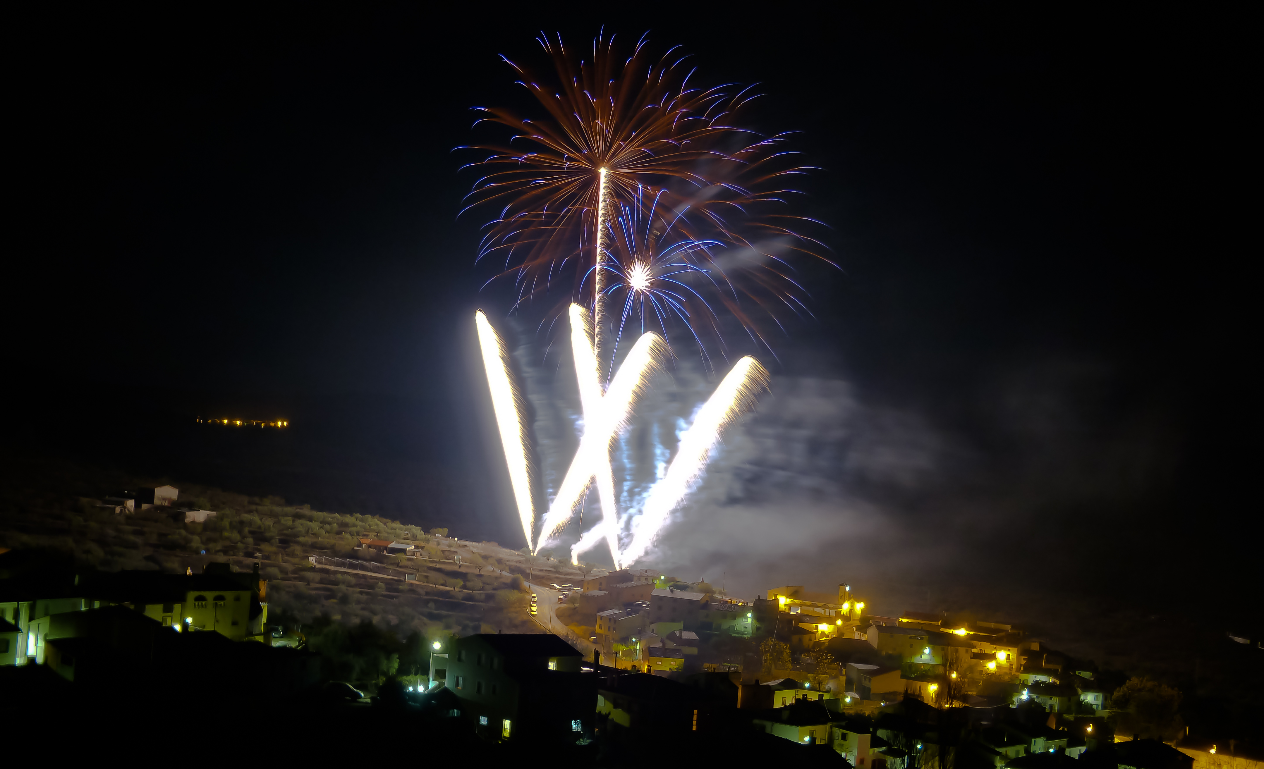 Fiestas en honor a la patrona Santa Barbara